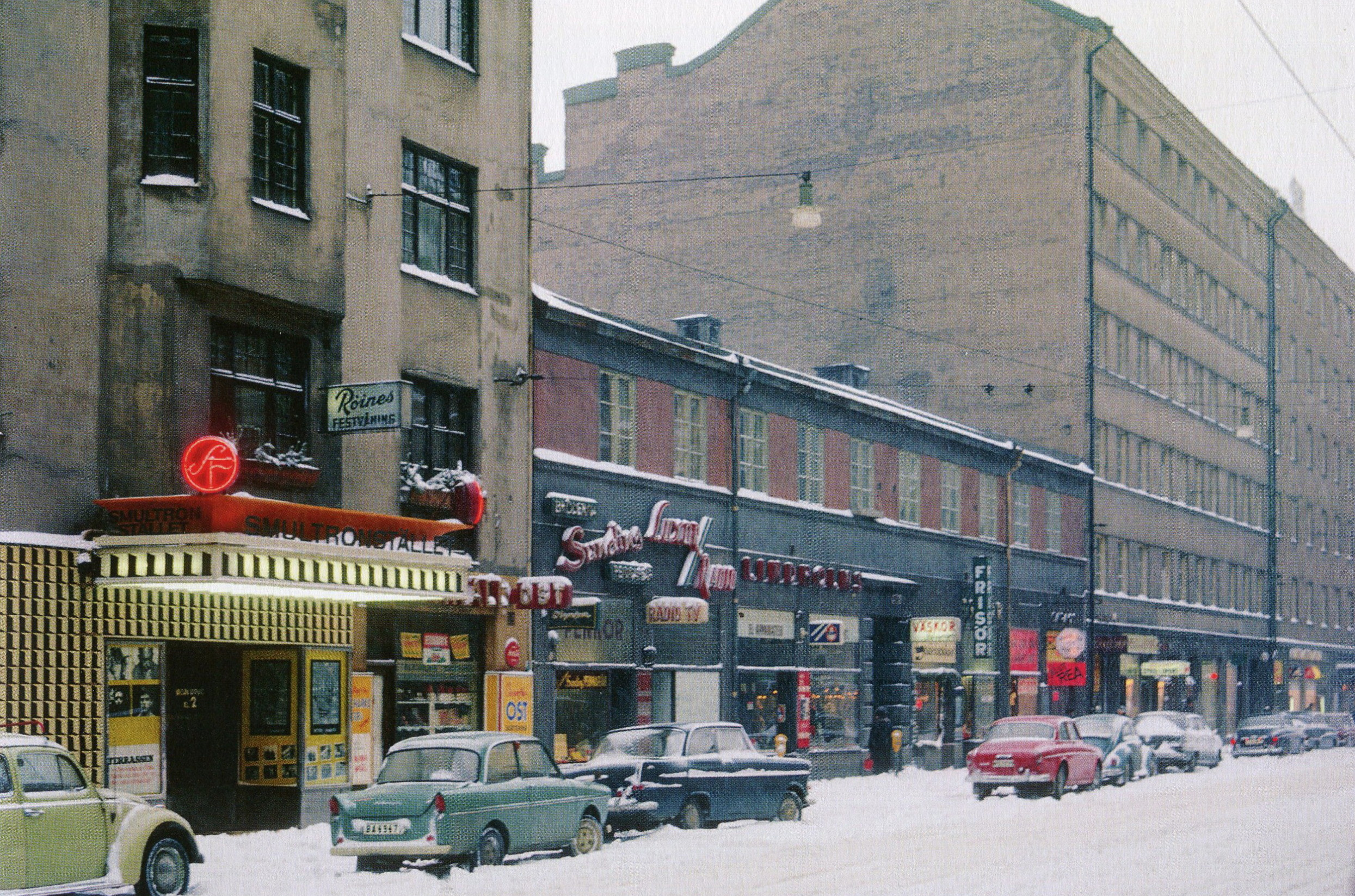 Biograf Smultronstället och kvarteret Vägaren, Folkungagatan, Stockholm